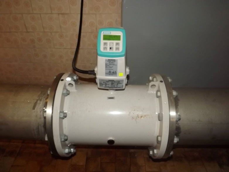 Elektromagnetinis debitomatis